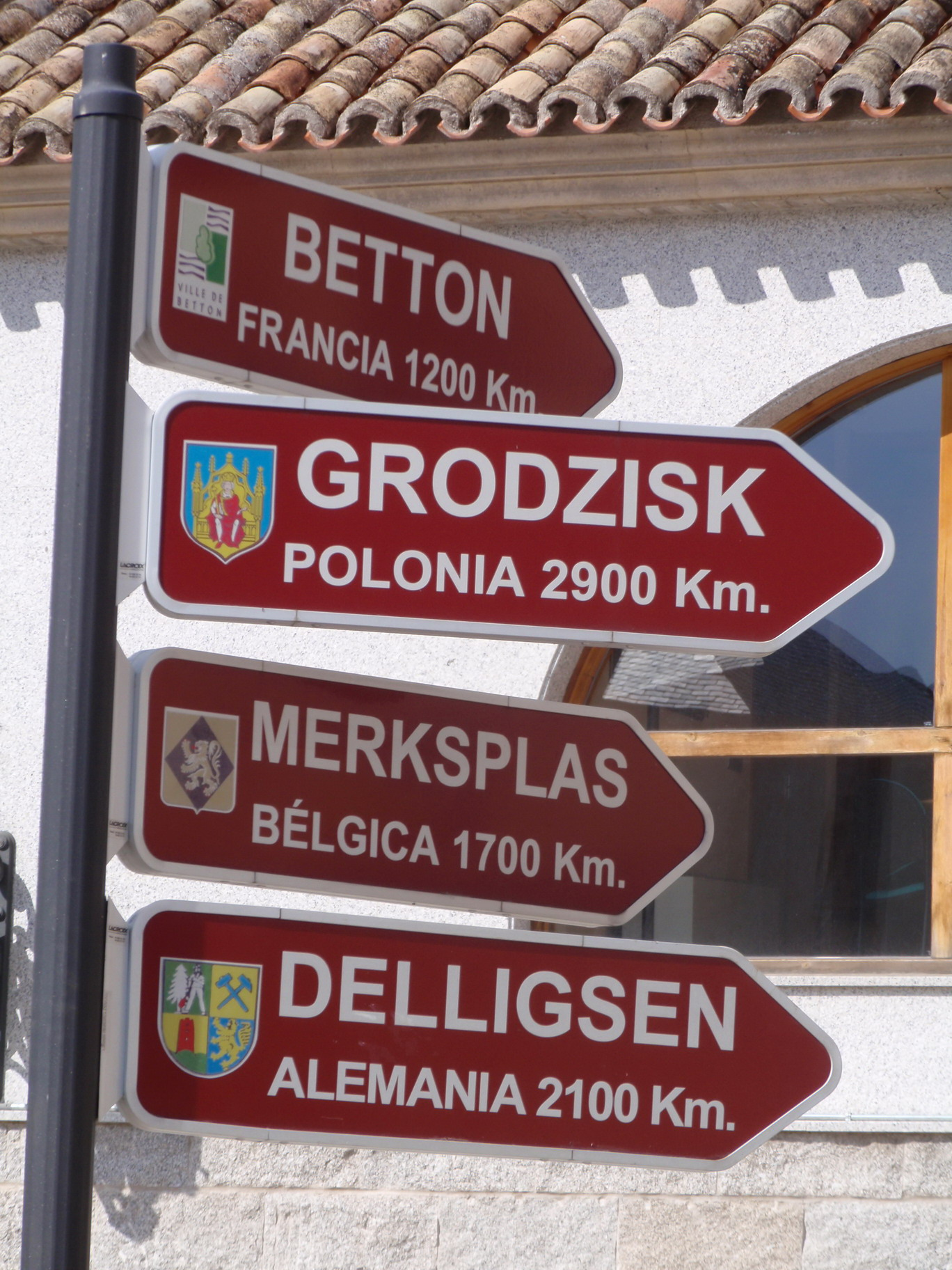 Detalle del indicador con la dirección y kilómetros a las ciudades hermanas de Torrelodones, situado junto al Ayuntamiento.